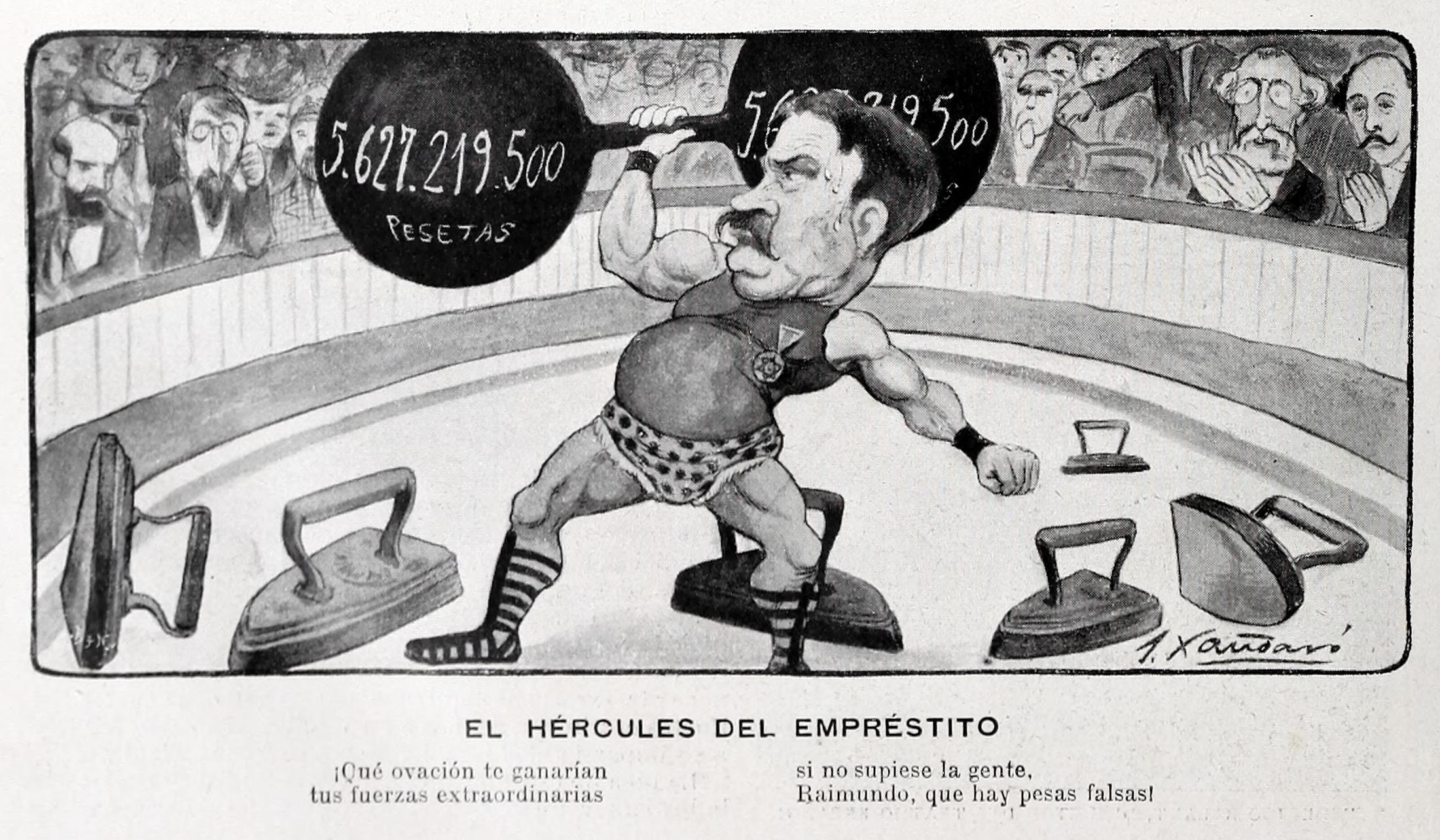 El Hércules del empréstito. ¡Qué ovación te ganarían tus fuerzas extraordinarias si no supiese la gente, Raimundo, que hay pesas falsas!